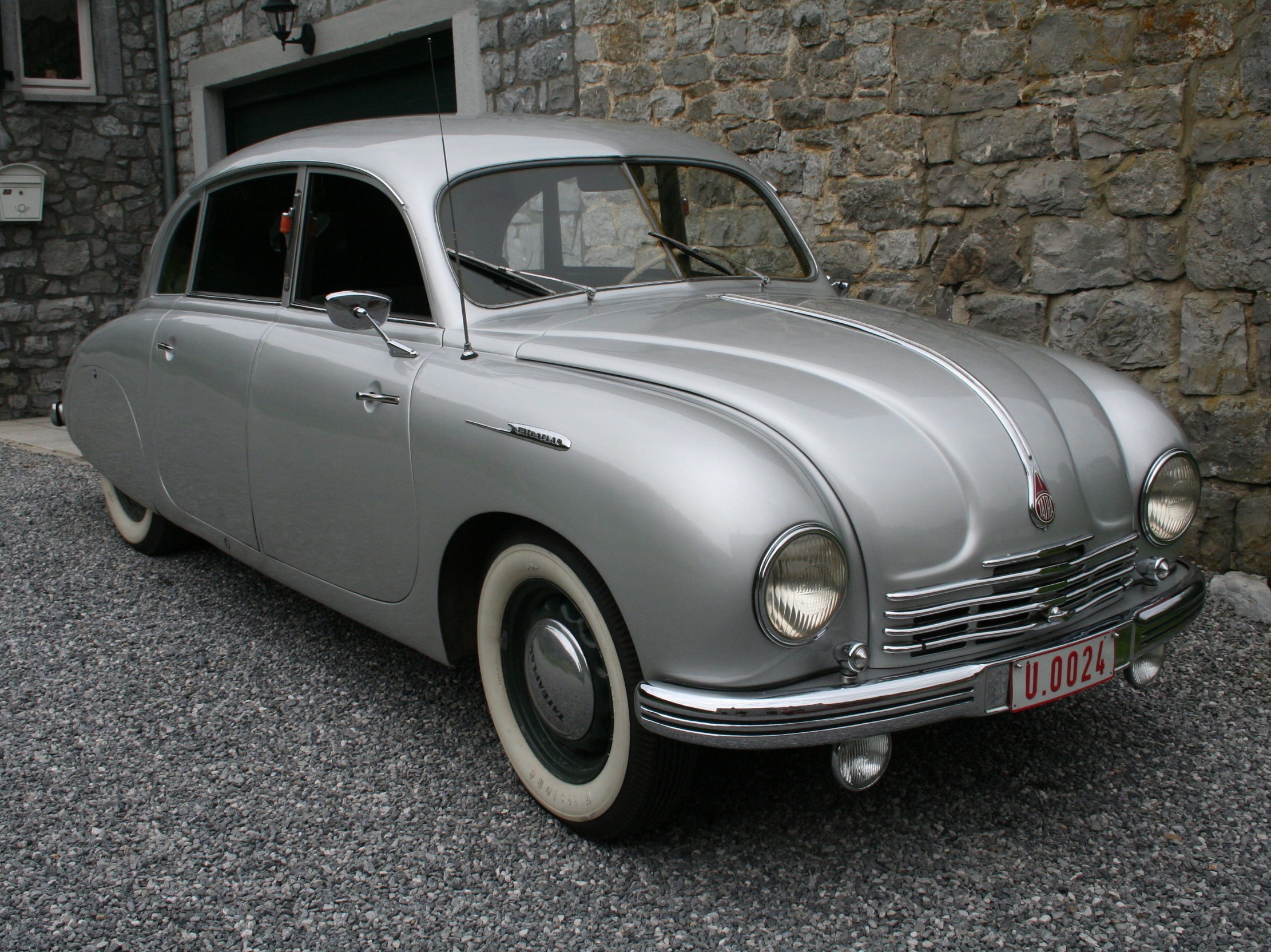 Automobile Tatra T600 Tatraplan.